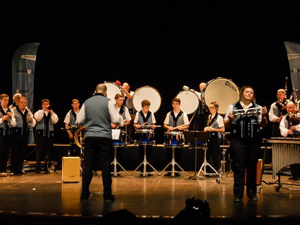 Épreuve d'hiver du Championnat national des bagadoù de Quatrième catégorie organisée au Palais des Congrès de Pontivy le 21 février 2016.